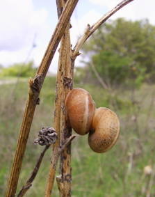 Равлик-монах чагарниковий Monacha fruticola (Krynicki, 1833)